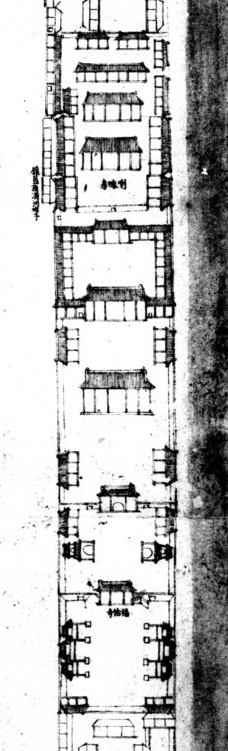 乾隆十五年（1750年）完成的《乾隆京城全图》中的福佑寺及其附近地区。本图来自清內務府藏京城全圖，故宮博物院影印，民國二十九年十二月（1940年）。